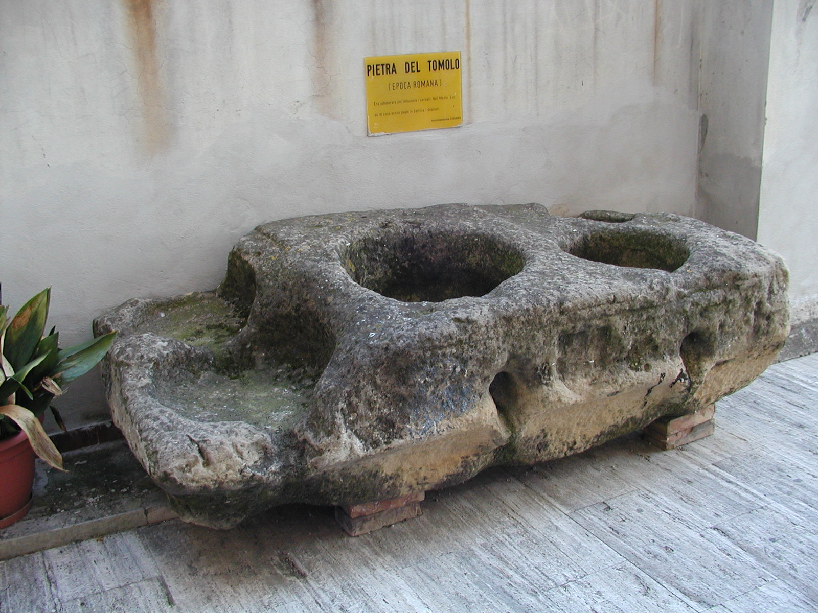 Ein alter Mühlstein